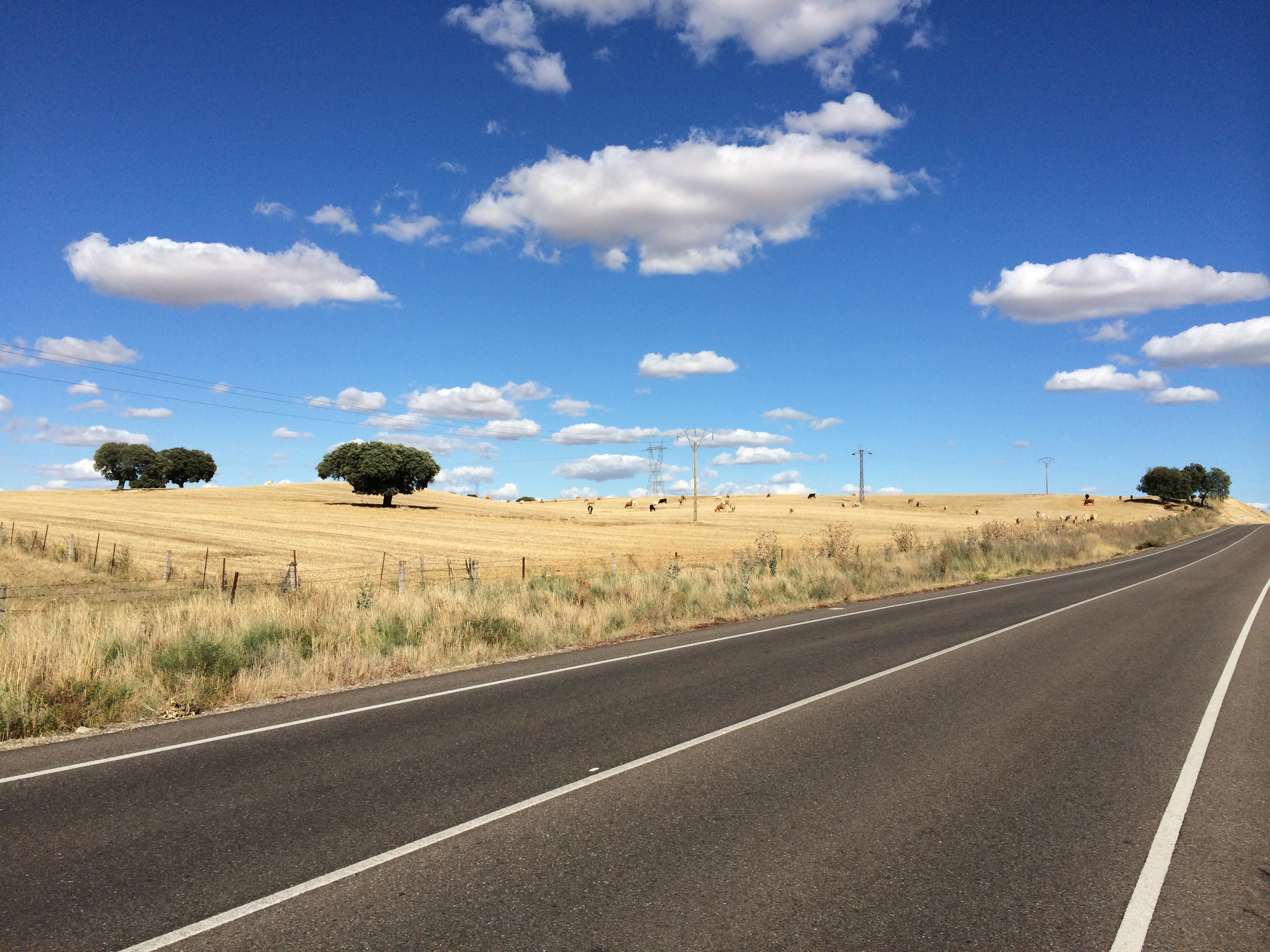 Sunday Walk Salamanca - Almenara de Tormes - Salamanca 44km